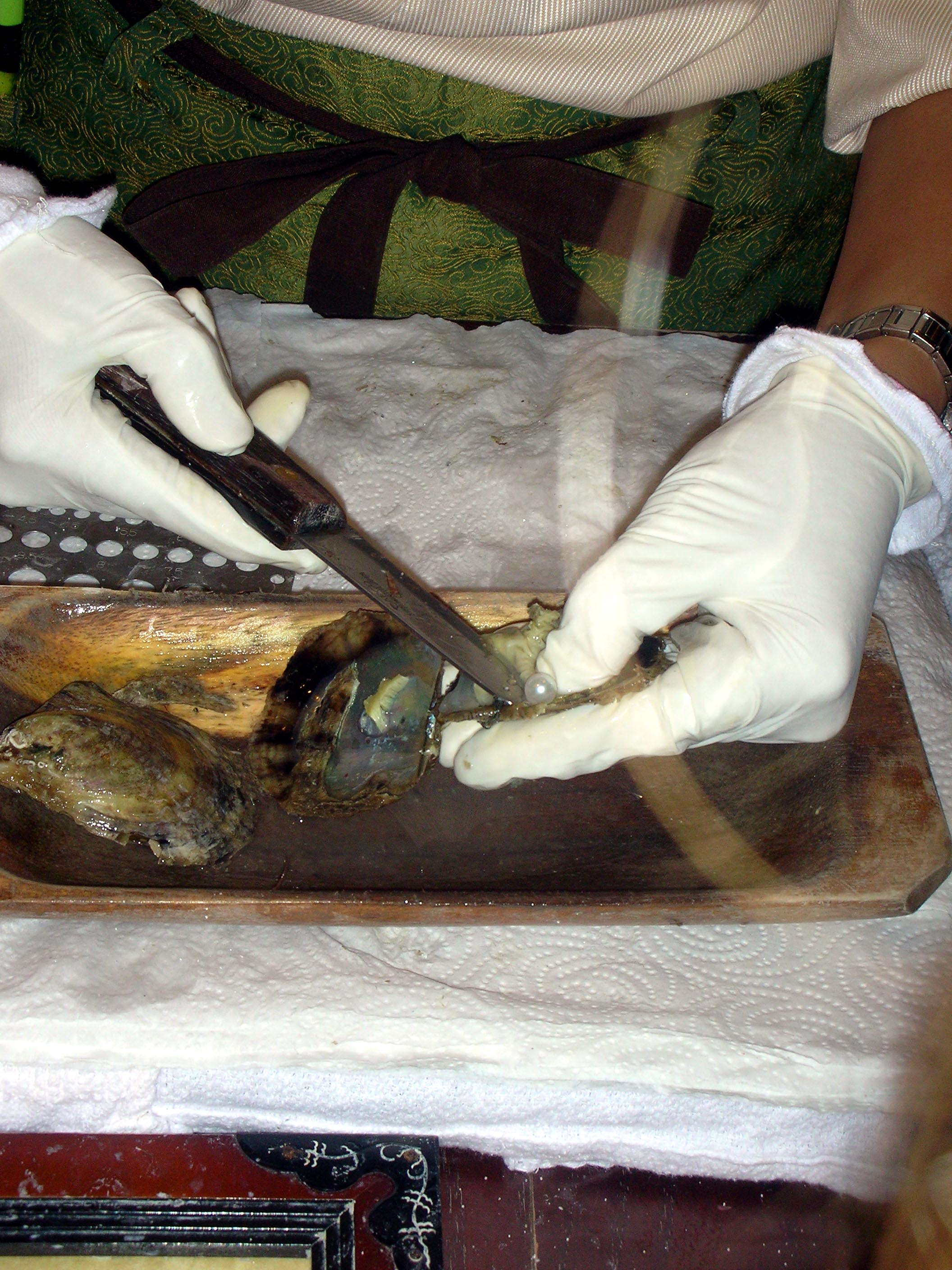 pearl exposure